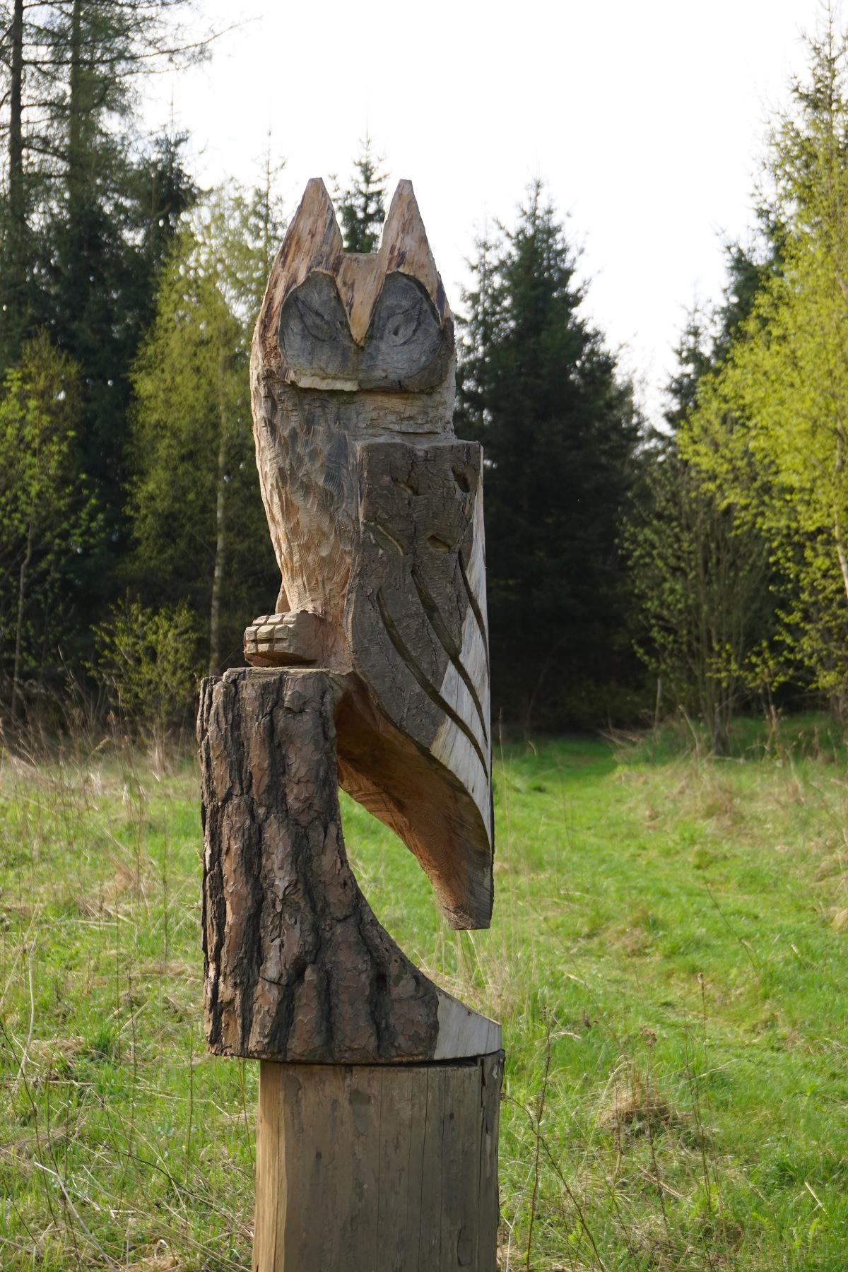 Socha sovy Rozárky na naučné stezce